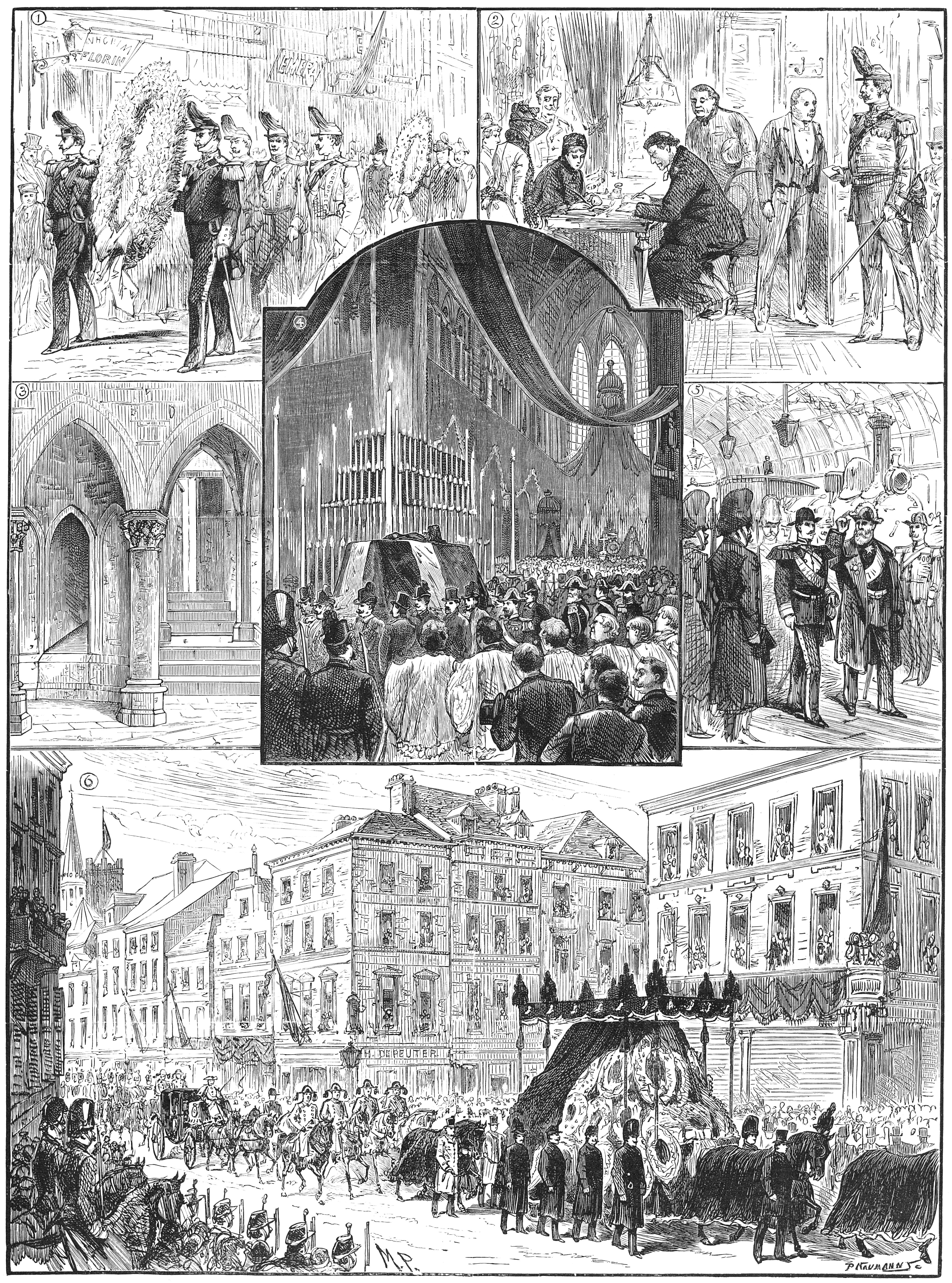 Funérailles du prince Baudouin de Belgique, Bruxelles et Laeken, le 29 janvier 1891. — Le prince Baudouin est mort le 23 janvier 1891 d’une pneumonie. Il n’avait que 21 ans et était pressentit pour succéder à son oncle le roi Léopold II. Les jours précédents sa mort, il avait régulièrement visité sa sœur malade, Henriette. Les funérailles furent célébrées le 29 janvier 1891 en la cathédrale des Saints-Michel-et-Gudule à Bruxelles. Le corps du défunt fut ensuite placé dans la crypte royale située en dessous de l’église royale de Laeken. Après sa mort, ce fut son plus jeune frère, Albert, futur roi Albert Ier, qui devint l’héritier du trône.